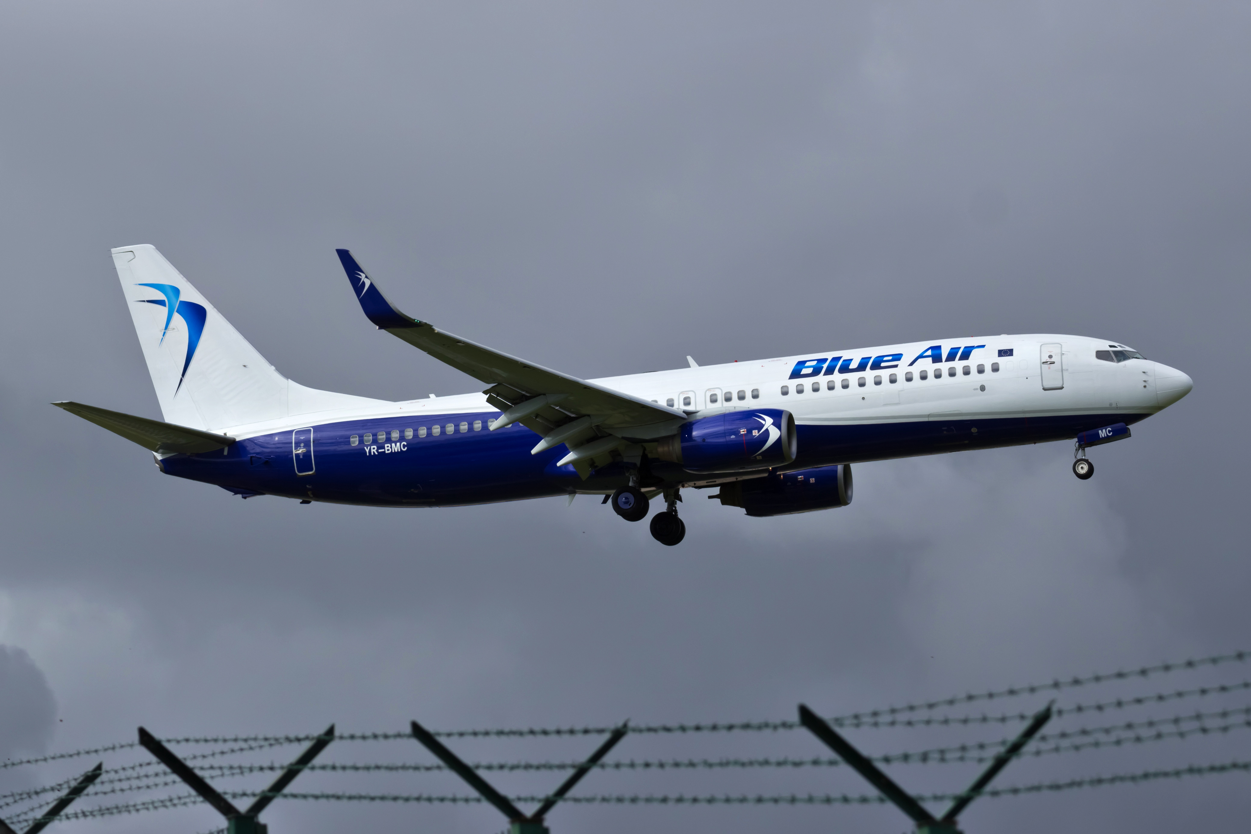 Boeing 737 de Blue Air aterrando no aeroporto de Lisboa.